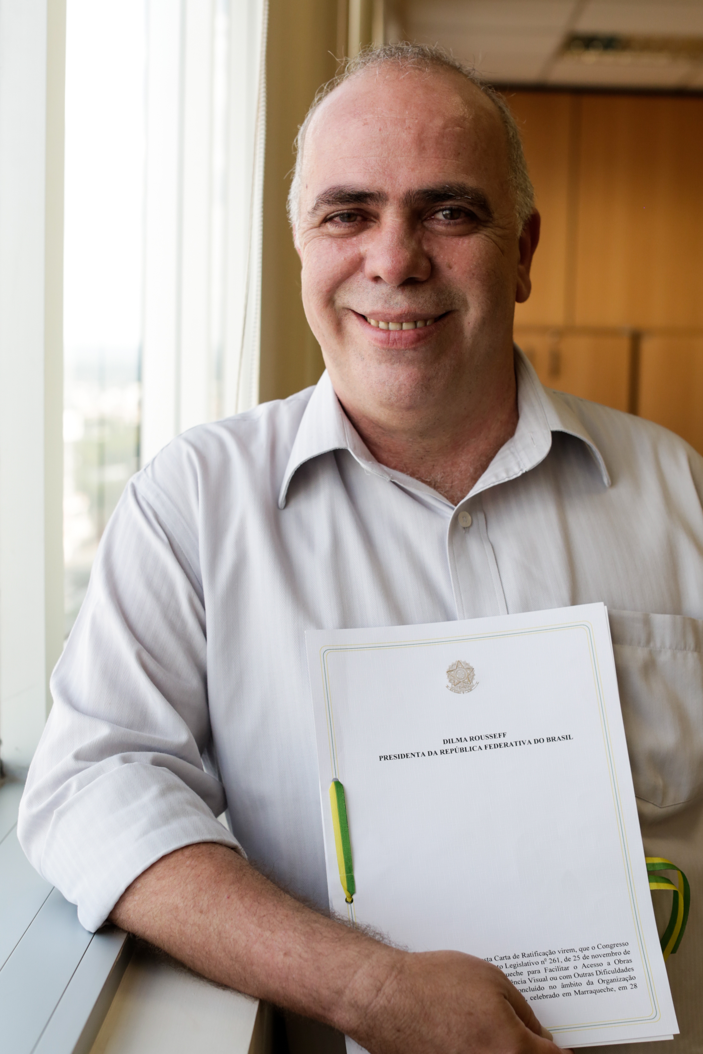 Com a assinatura da presidenta da República, Dilma Rousseff, o Brasil ratificou, nessa terça-feira (1), o Tratado de Marraqueche, que visa facilitar o acesso de pessoas com deficiência visual a obras literárias. A adesão ao tratado havia sido aprovada pelo Senado Federal no último dia 24 de novembro, em dois turnos, após passar pela Câmara dos Deputados. Para finalizar o processo de adesão do Brasil, o diretor de Direitos Intelectuais do Ministério da Cultura, Marcos Souza, irá depositar a carta de ratificação na sede da Organização Mundial da Propriedade Intelectual (OMPI), na Suíça, na próxima semana, quando participa da 31ª Sessão do Comitê Permanente de Direito do Autor e Direitos Conexos da organização internacional. As nações que aderirem ao acordo se comprometem a criar dispositivos na legislação nacional para que obras, tais como livros e outros materiais em formato de texto e ilustrações correlatas, possam ser reproduzidas e distribuídas em formatos acessíveis, como o Braille, Daisy ou mesmo em audiolivro, sem a necessidade de autorização do titular de direitos autorais. O tratado entrará em vigor depois de ratificado em 20 países. Atualmente, outros 11 já estão nessa condição: Argentina, Coreia do Sul, El Salvador, Emirados Árabes Unidos, Índia, Mali, México, Mongólia, Paraguai, Cingapura e Uruguai. Foto:LiadePaula/MinC 02/12/2015 Brasília-DF